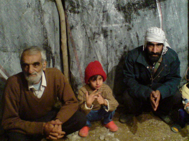 جواد حسن پور در کنار مهرداد محمدی روستای سرزنگوله